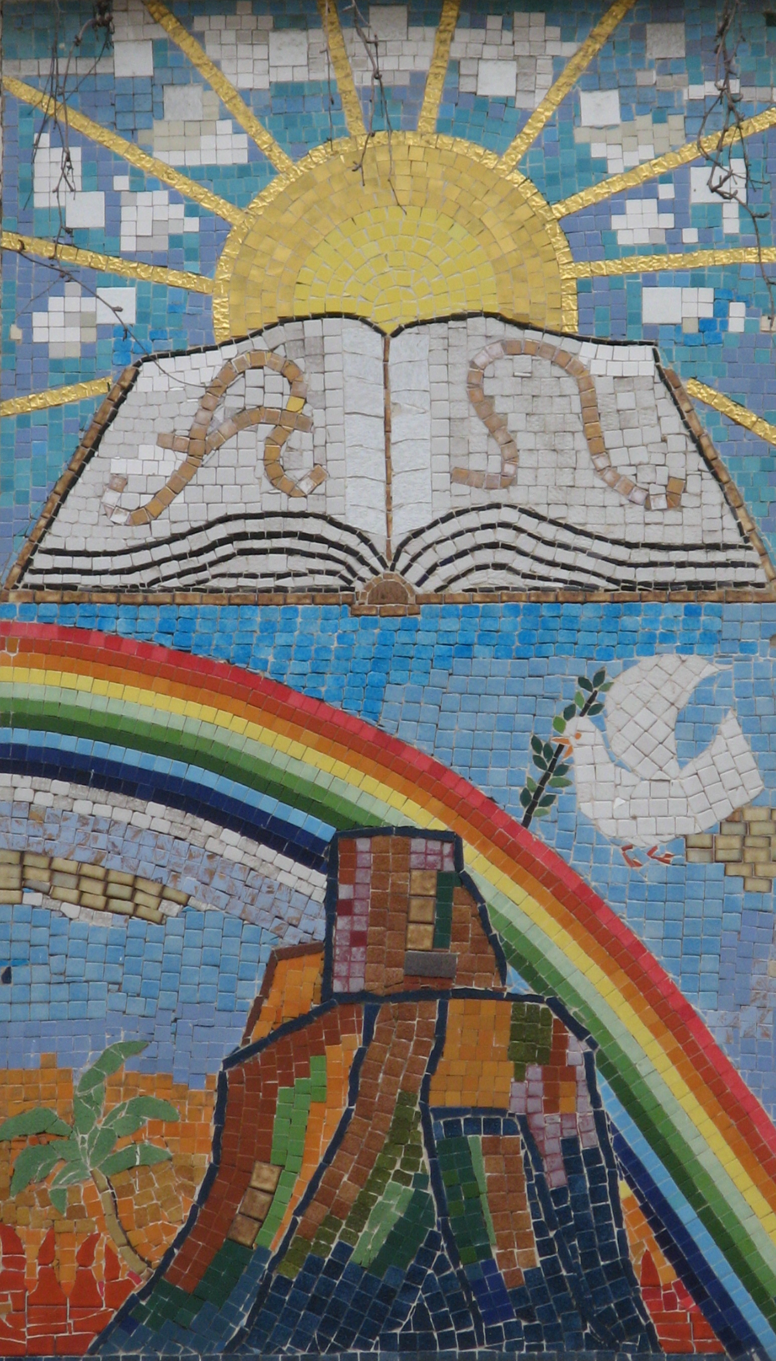 Mosaik Alpha und Omega und Arche Noah, Buchengasse 108, Wien-Favoriten